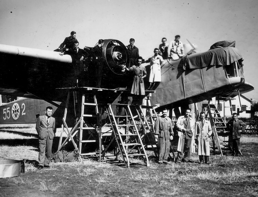 Flughafen Bozhurishte 1938, Instandsetzung von Motoren Bomber Dornier Do-11 "Fledermaus/Prilep" (Dornier Do.11)